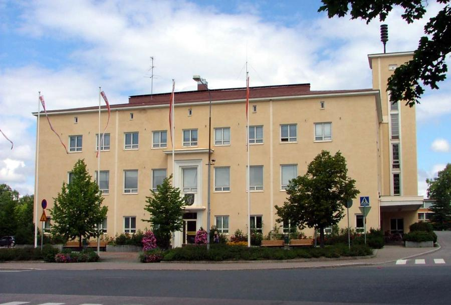 Kangasalan kunnantalo